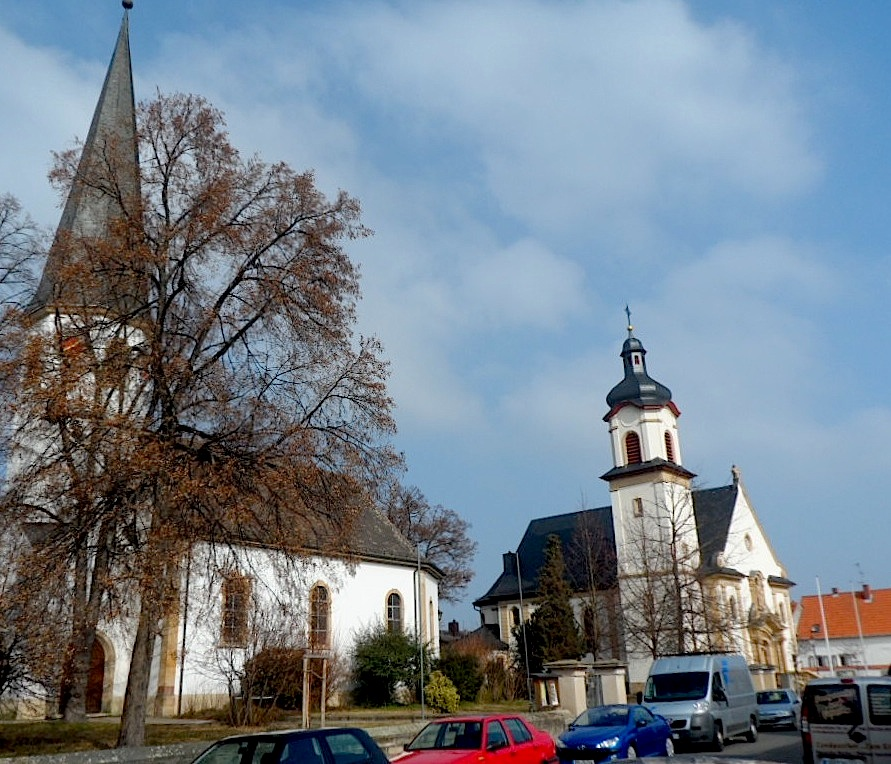 Beindersheim, ev.und kath. Kirche